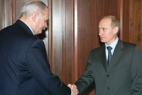 МОСКВА, КРЕМЛЬ. С кинорежиссером и актером Никитой Михалковым.